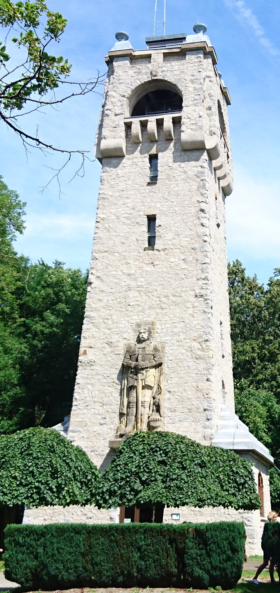 Vorderseite des Bismarckturms in Bad Pyrmont